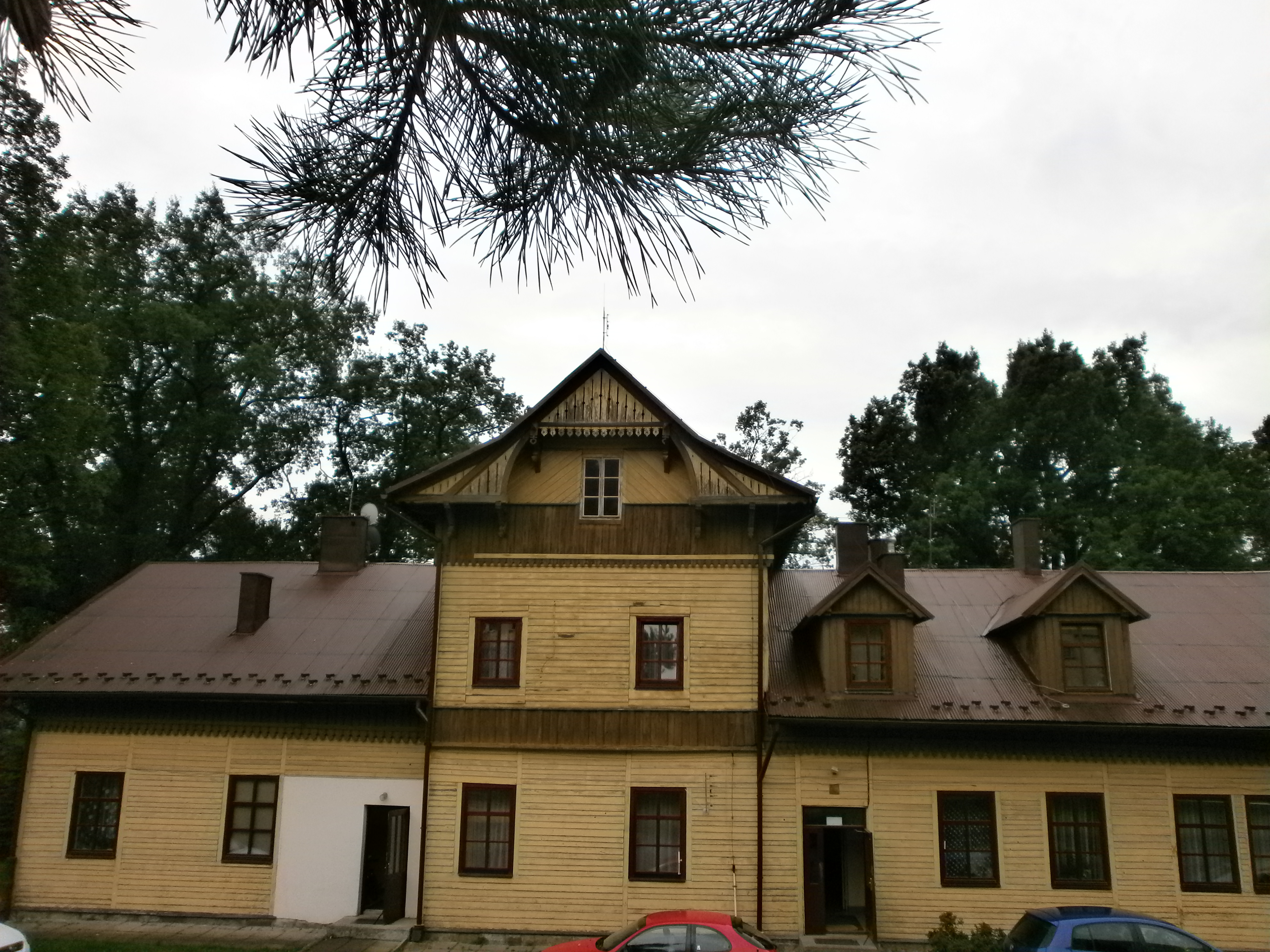 Tymbark, dwór, pocz. XIX